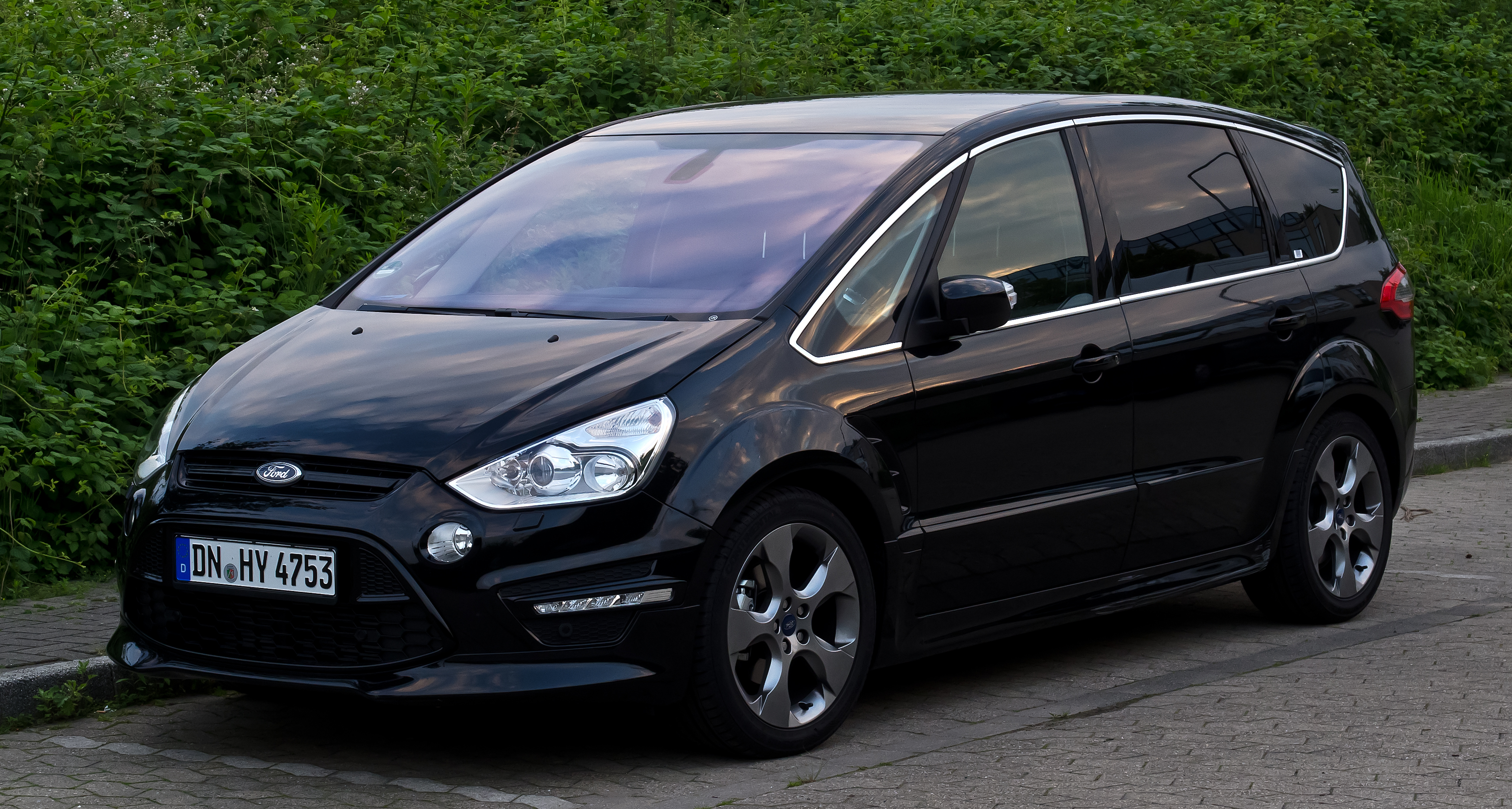 Ford S-Max Titanium S (Facelift)